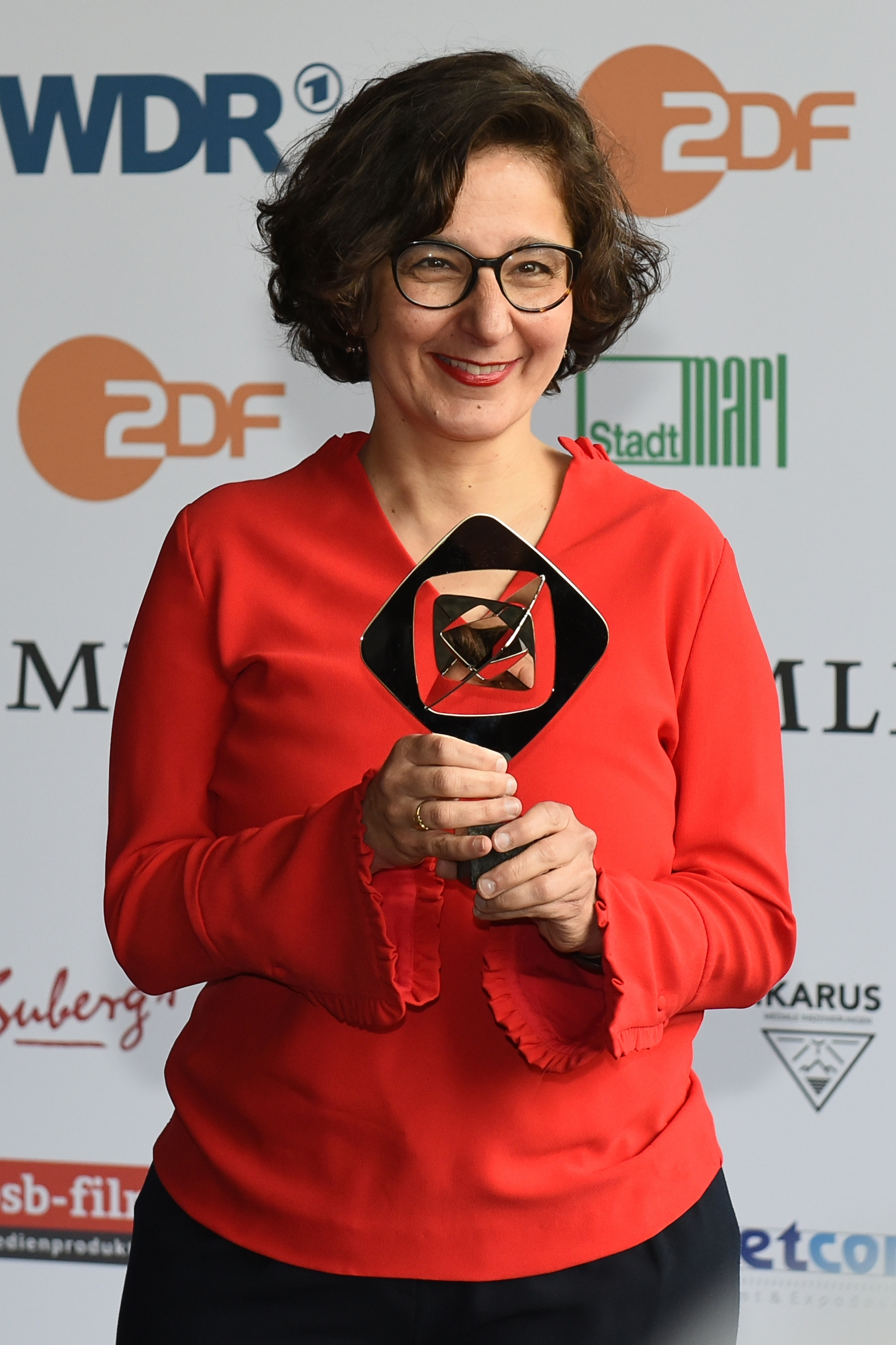 Verleihung des Grimme-Preises 2019.